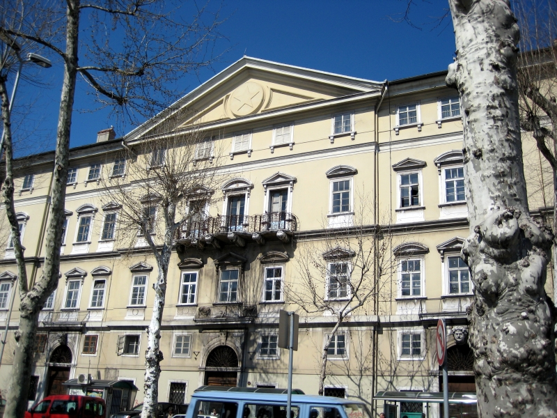 zgrada bivše rafinerije šećera, Rijeka